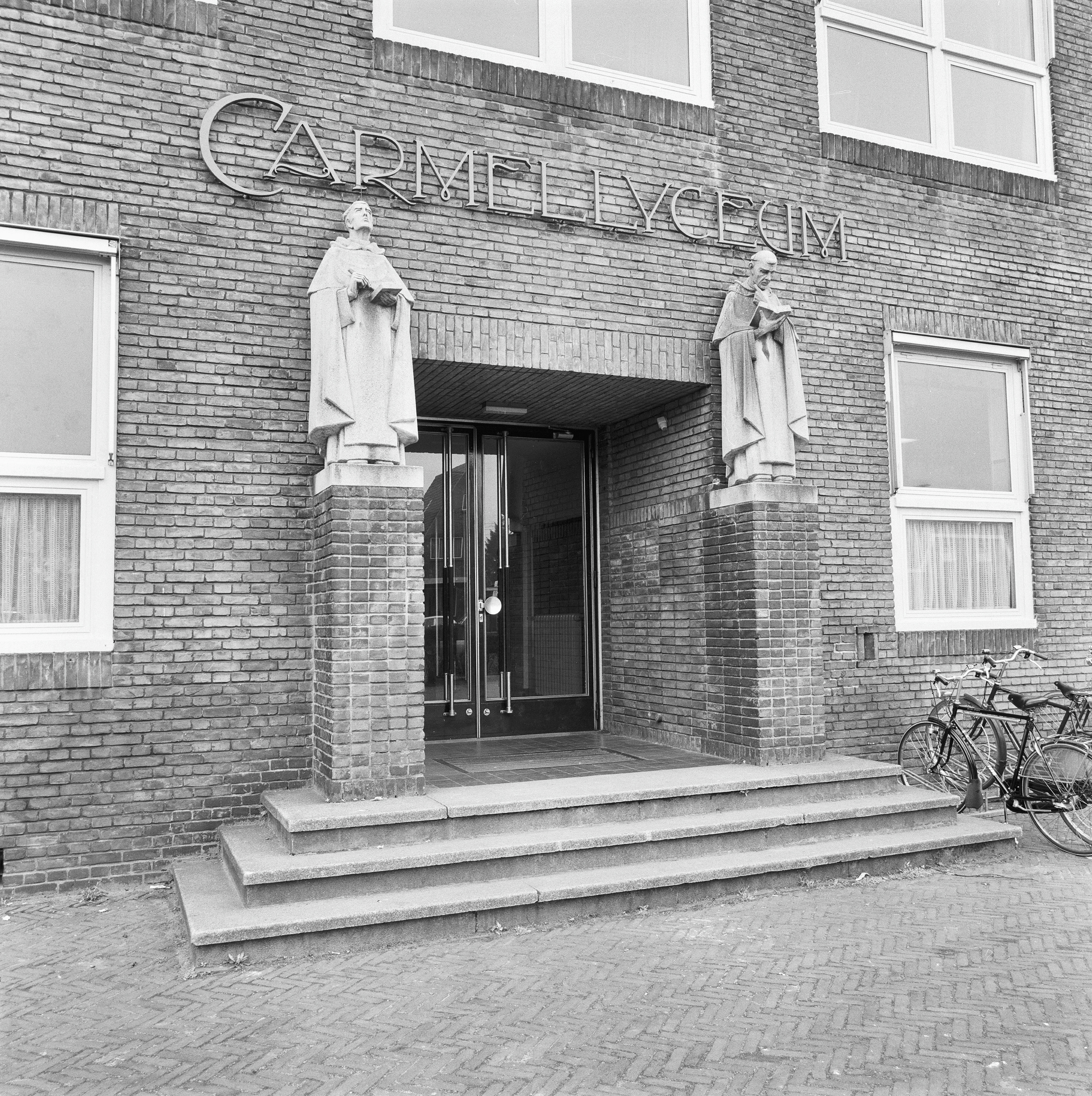 CARMELLYCEUM: Exterieur OVERZICHT TOEGANGSPARTIJ